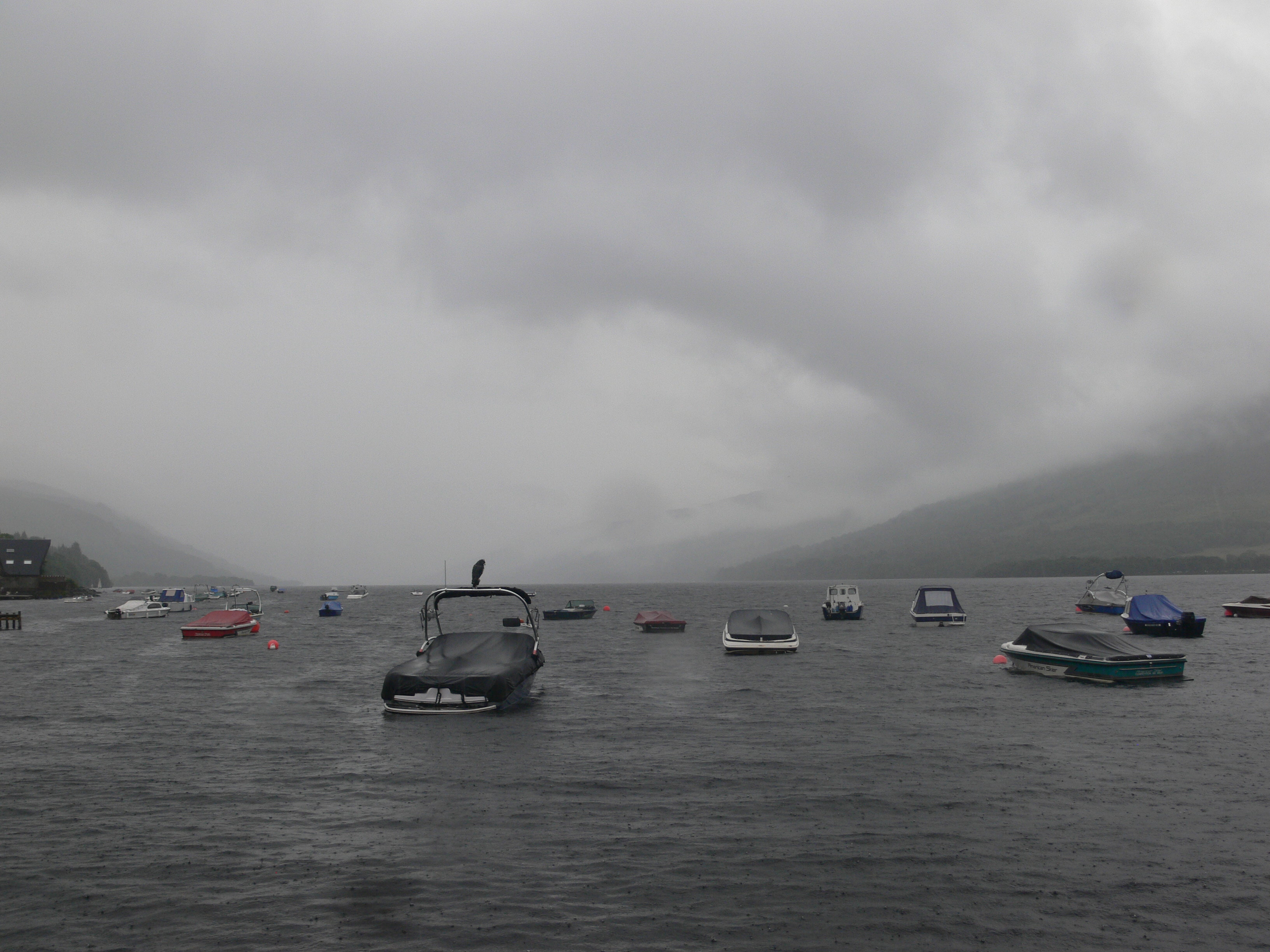 Le loch Earn depuis l'ouest